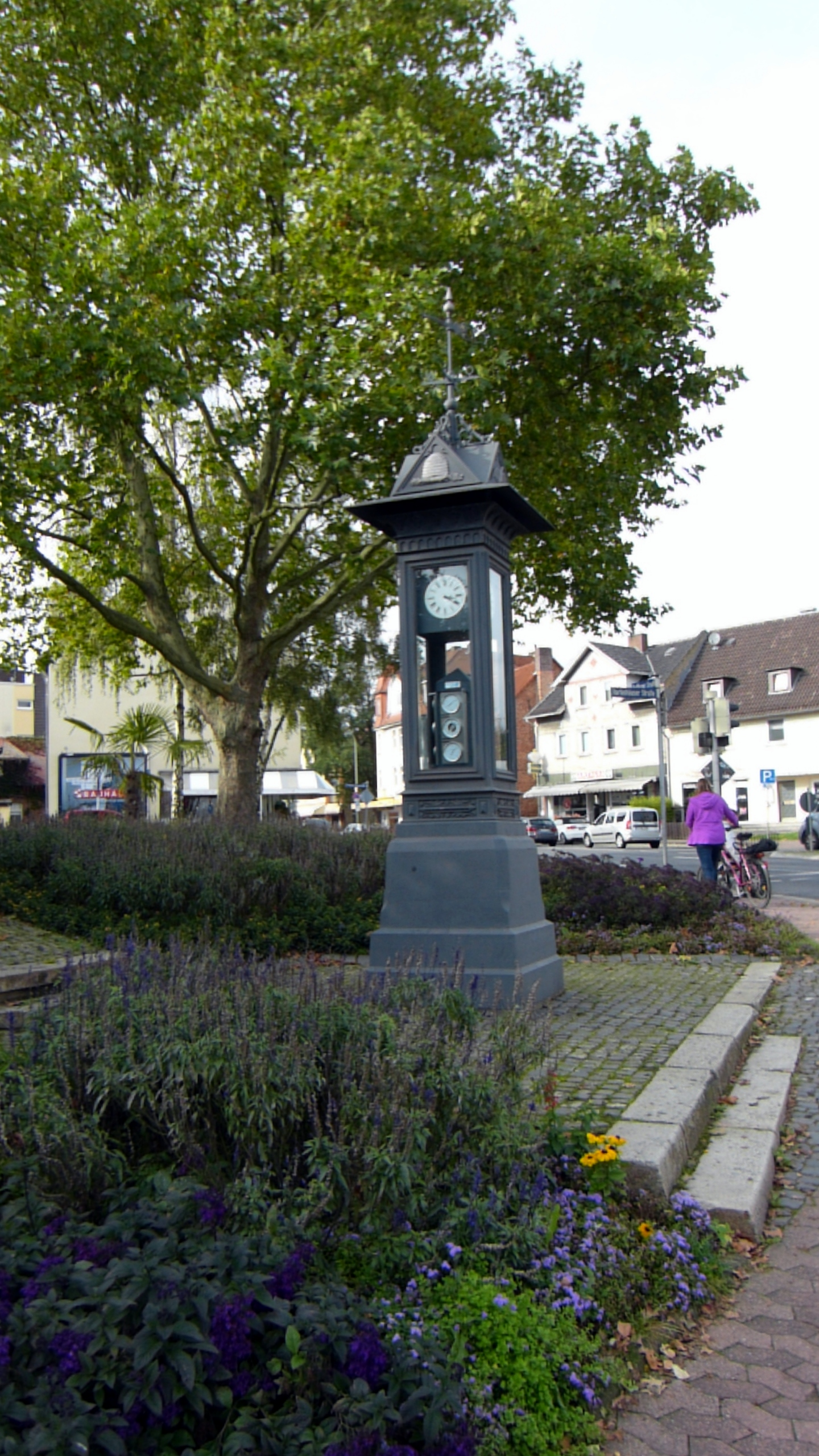 Uhrtürmchen in Kassel-Harleshausen